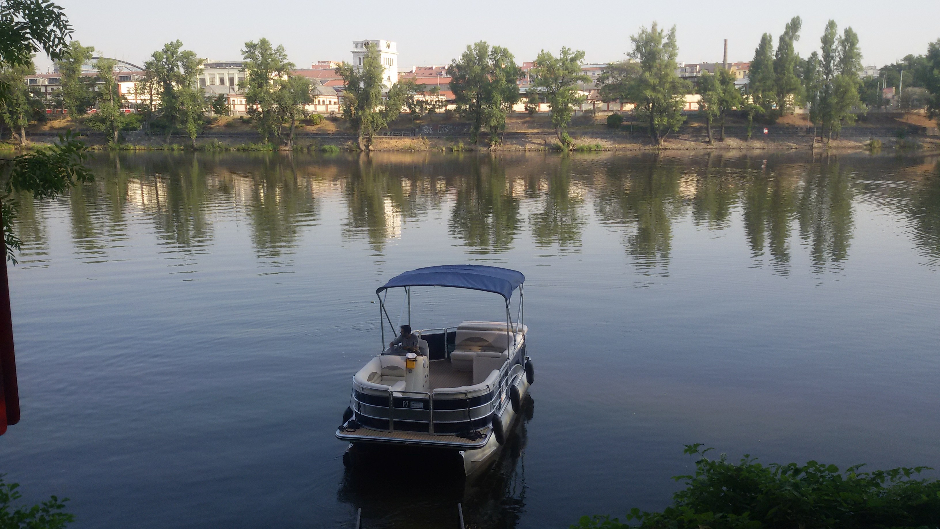 Praha, přívoz PID č. P7 Pražská tržnice – Štvanice – Karlín-Rohanský ostrov